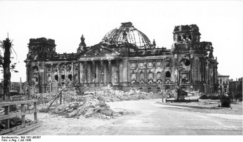 Zentralbild /SNB Berlin, Juli 1946 Blick vom Platz vor dem Brandenburger Tor auf die Ruine des Reichstagsgebäudes. 5050-50